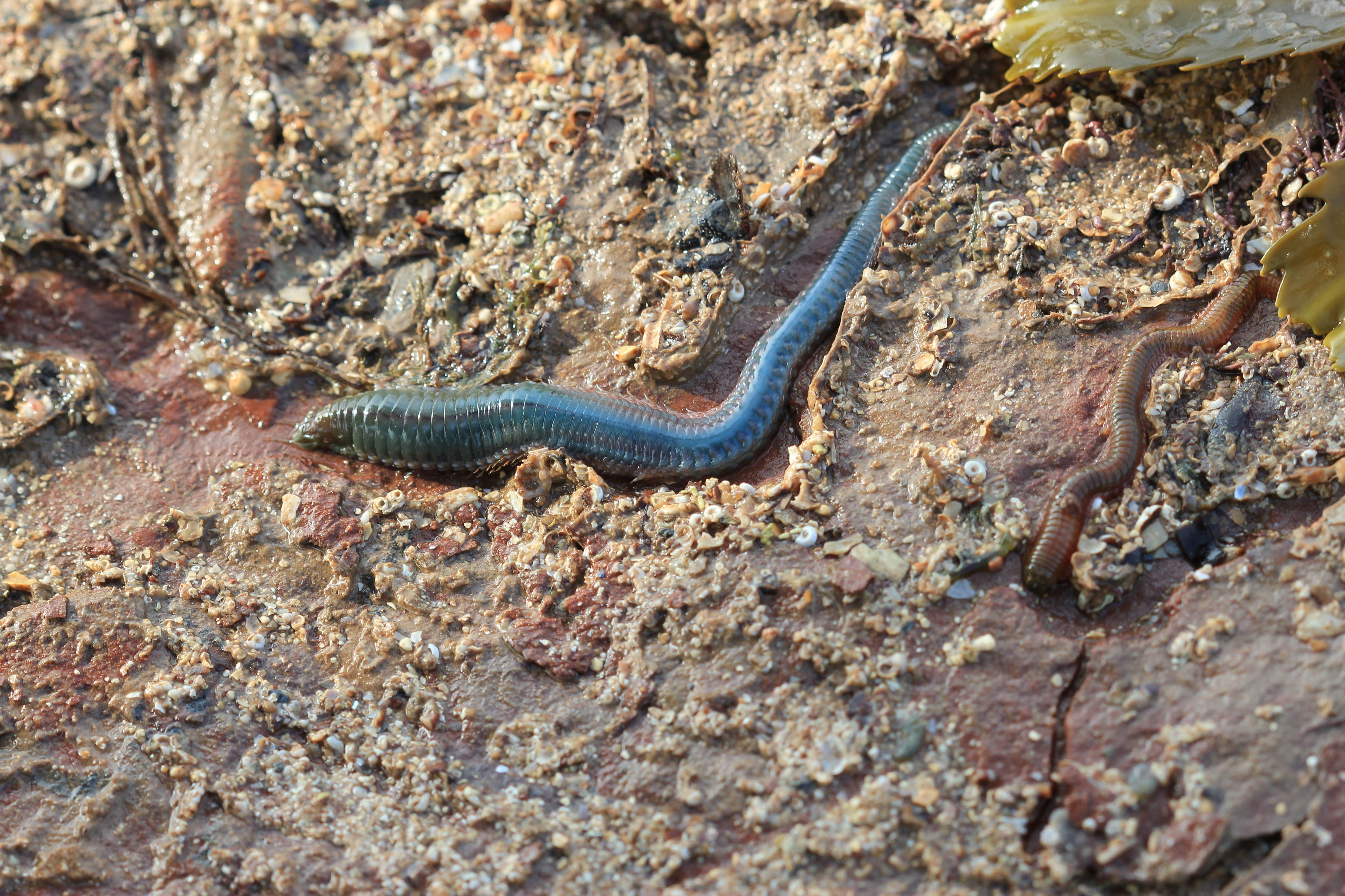 Grüner Seeringelwurm (Nereis virens, Synonym Alitta virens; rechts) und Seeringelwurm (Nereis diversicolor, Synonym Hediste diversicolor; links) auf Gestein des Helgoländer Felssockels (Naturschutzgebiet „Helgoländer Felssockel“).